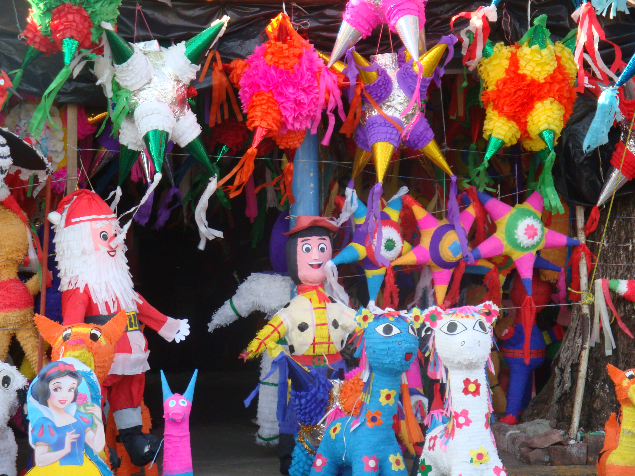 Tradicionales piñatas mexicanas hechas en el estado de Tabasco, México.